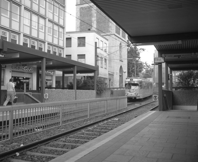 Tram at Heumarkt, Koln